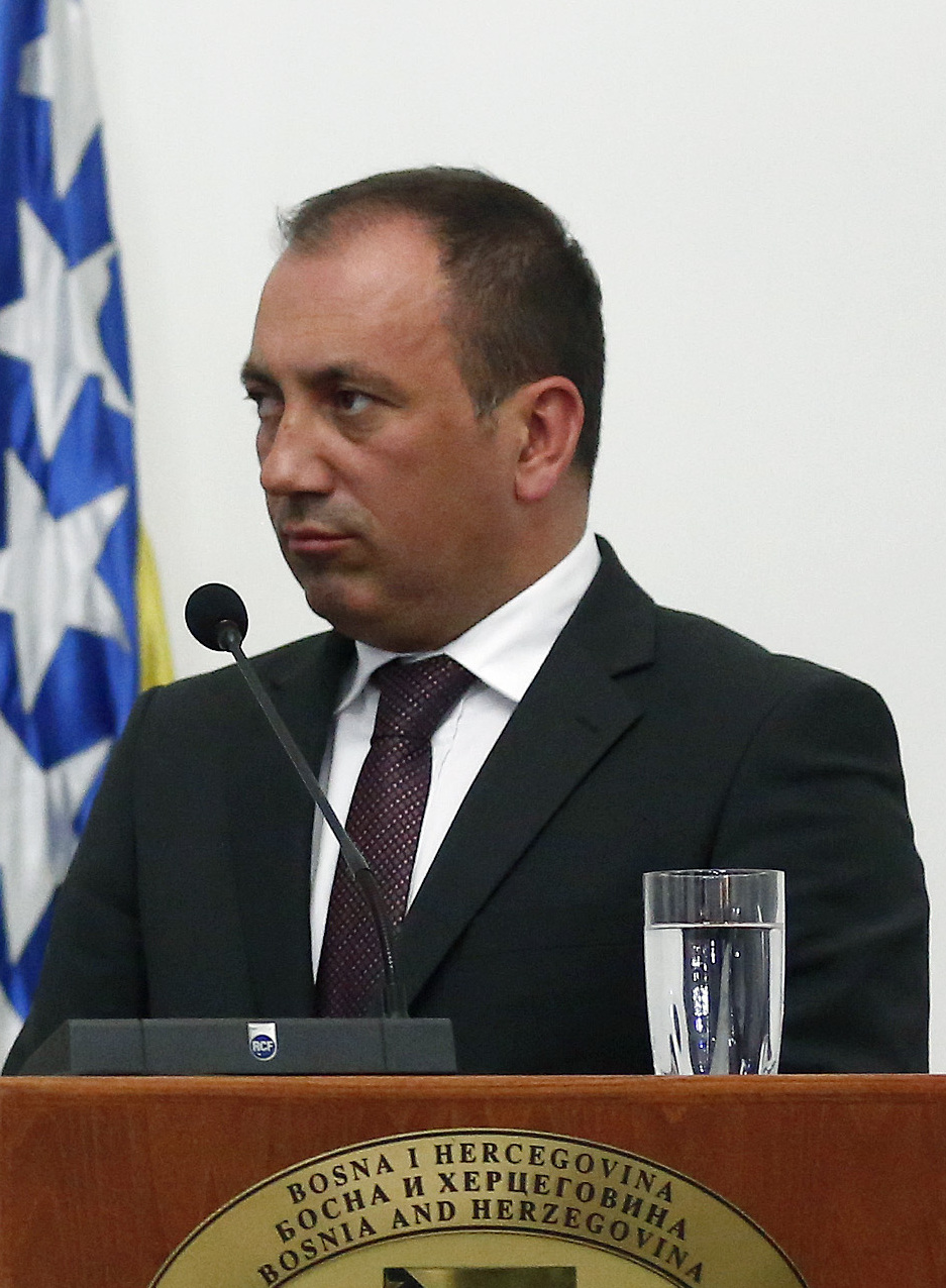 Arbeitsbesuch Bosnien. Bundesminister Sebastian Kurz trifft den bosnischen Außenminister Igor Crnadak. Pressekonferenz, Sarajevo, 18.06.2015, Foto: Dragan Tatic